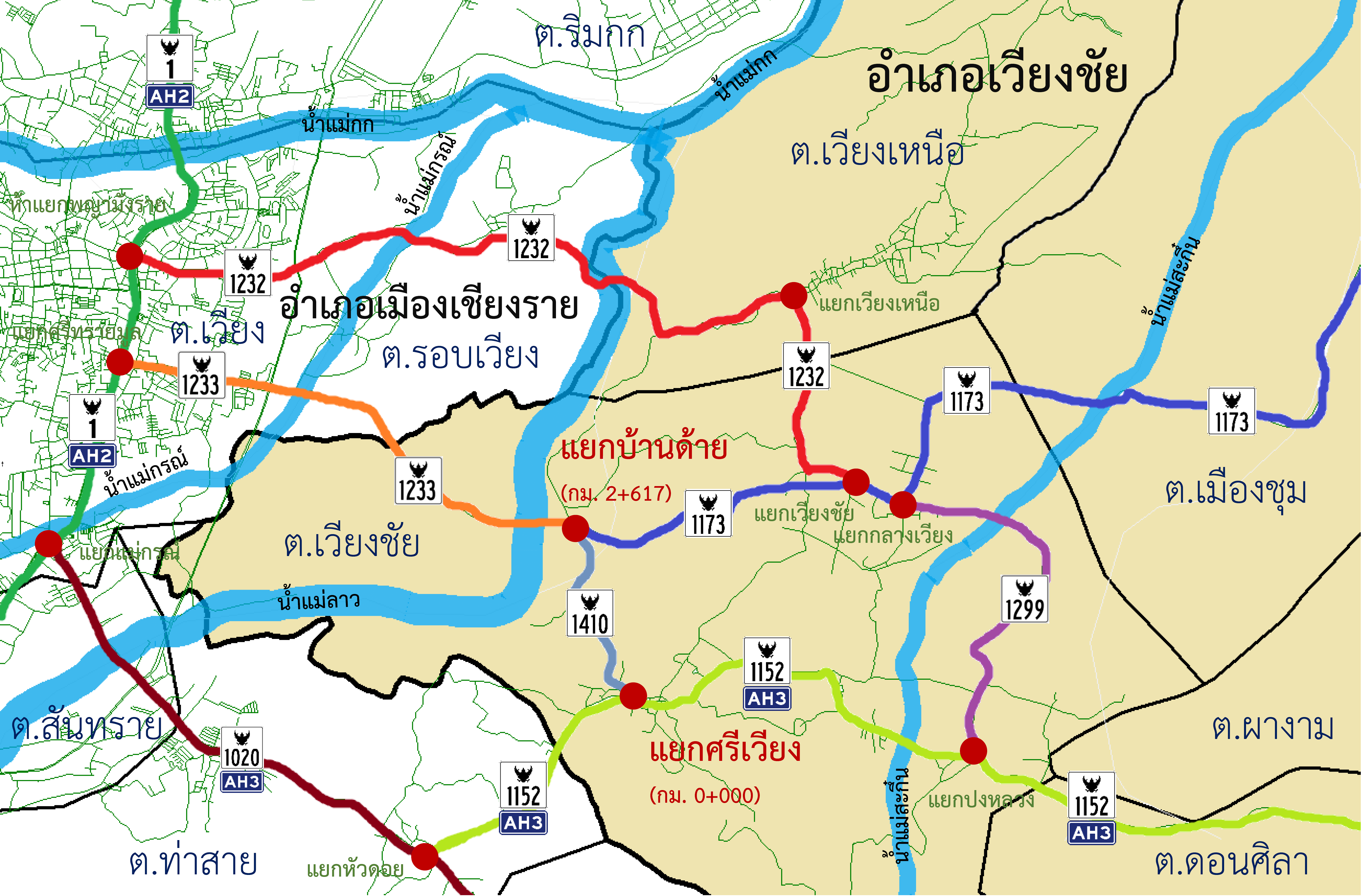 TH HW 1410 map